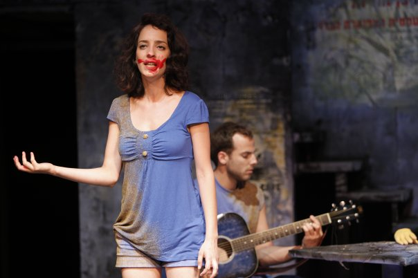 רוני דותן